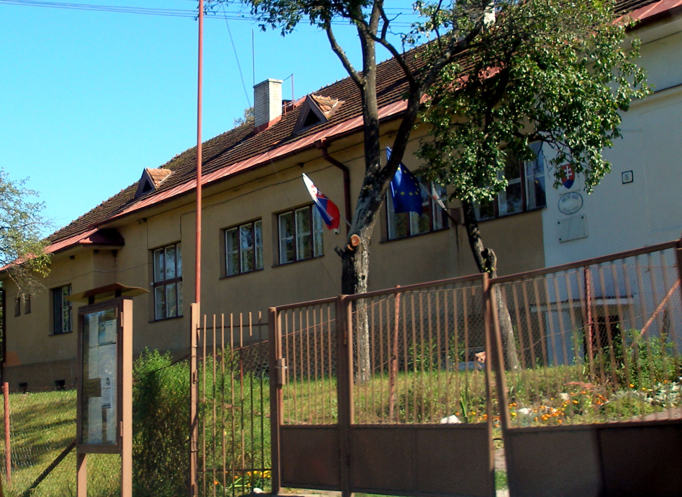 Spišská obec Stará Voda okres Gelnica.